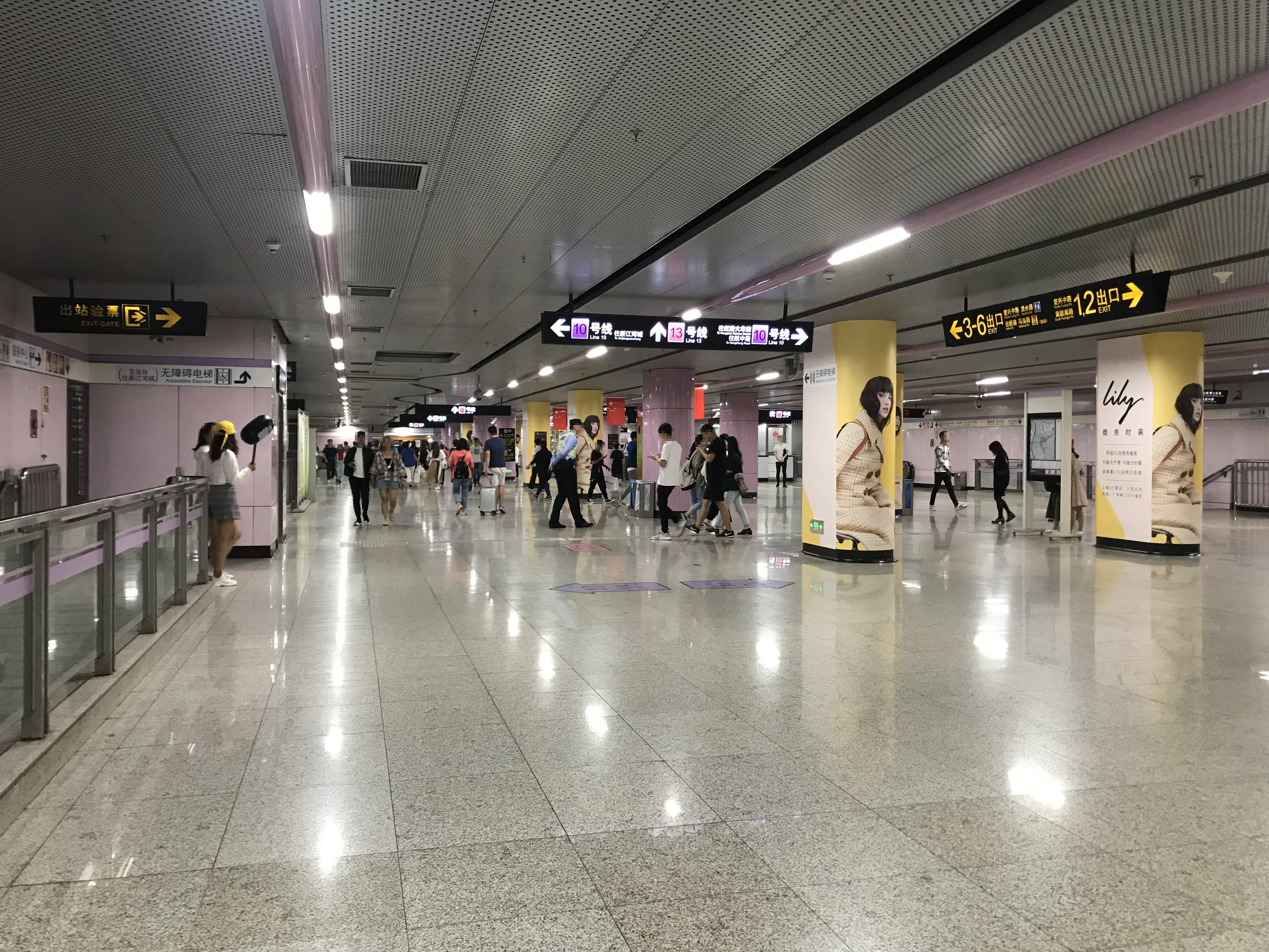 新天地駅構内